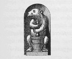 Apoteket Hvita Björns skylt